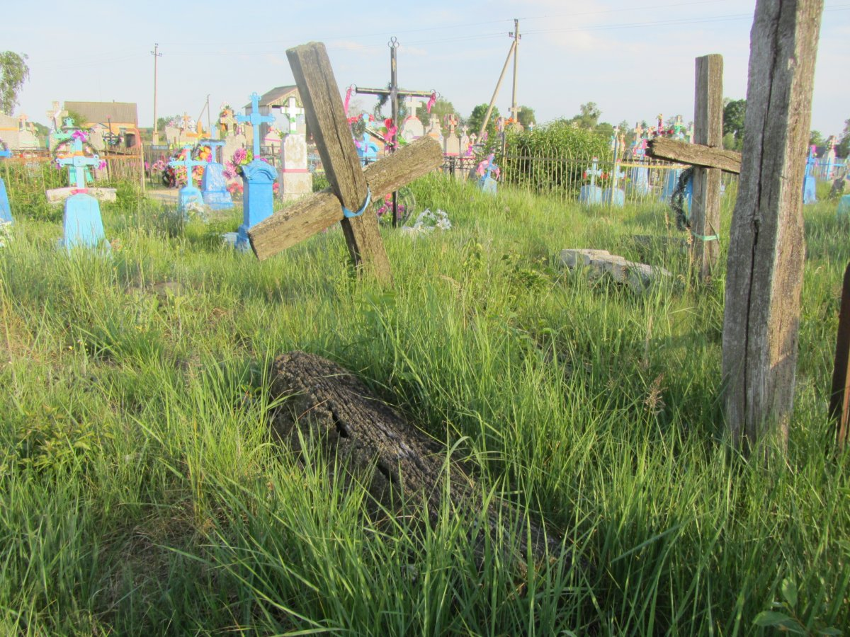 Парэ. Могілкі